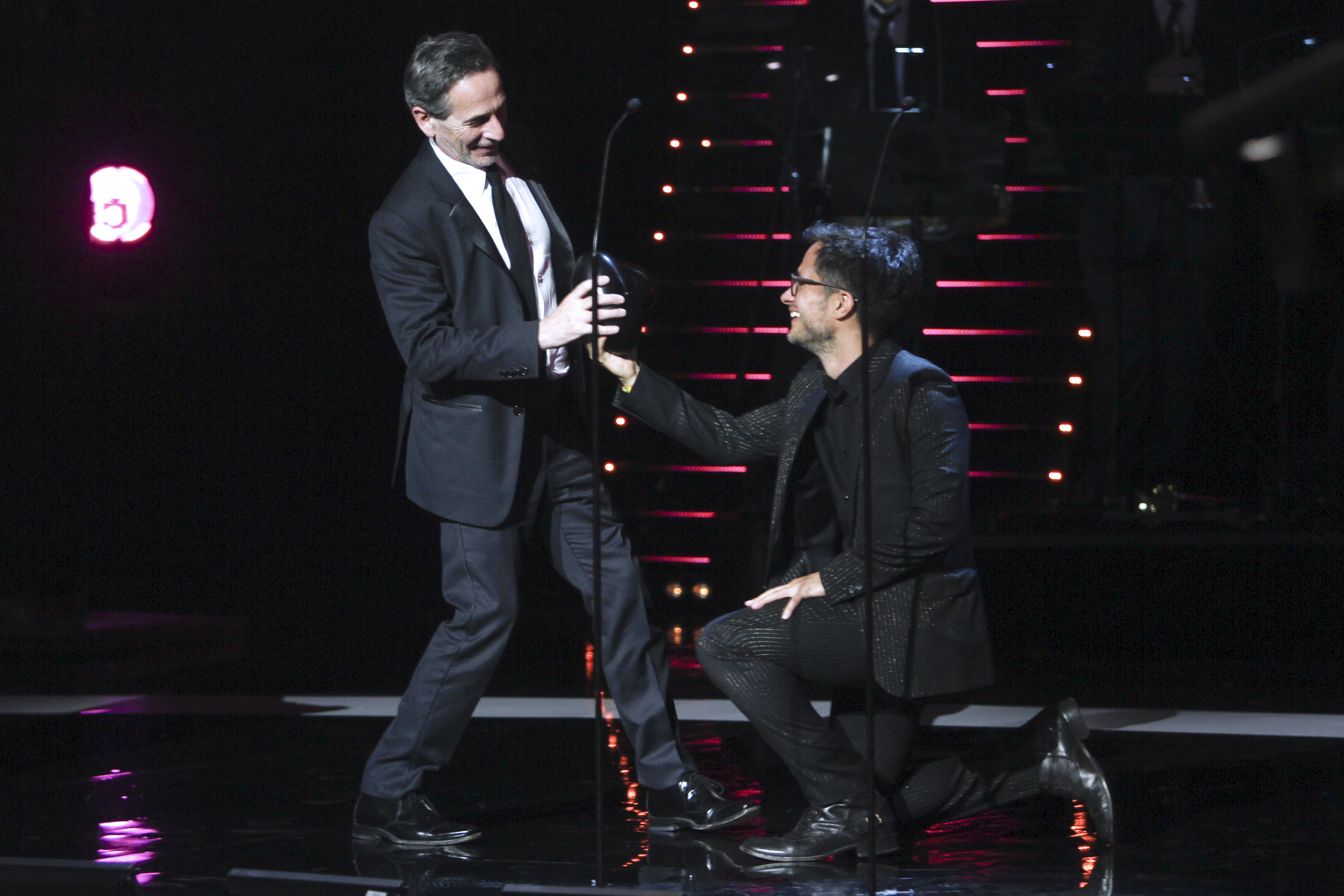 Miércoles 25 de noviembre de 2015. Se realizó la segunda entrega de los Fénix, Premio Iberoamericanos de Cine, en el Teatro de la Ciudad Esperanza Iris. Gael García Bernal entrega el premio Fénix al mejor actor a Alfredo Castro, por la película El Club, de Pablo Larraín. Fotografía: Milton Martínez/Secretaría de Cultura CDMX